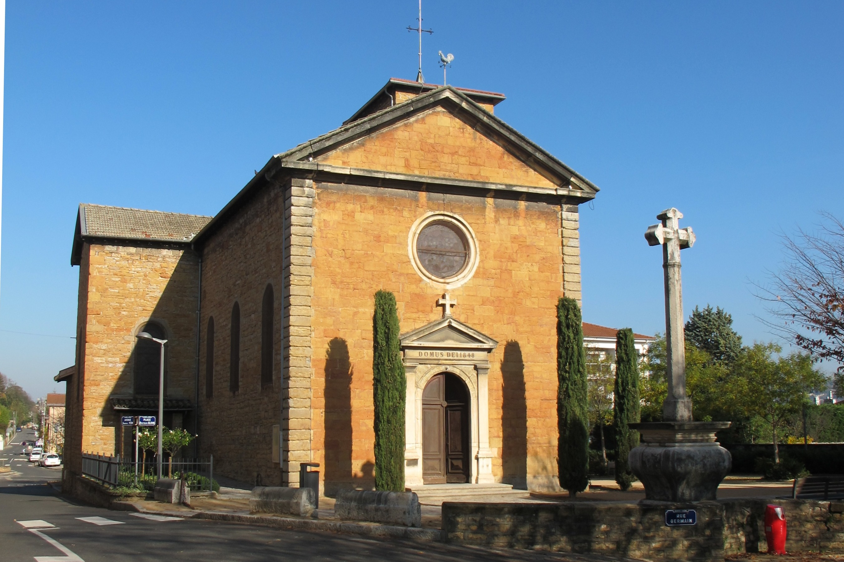 Église de la Nativité-de-Notre-Dame d'Albigny-sur-Saône - Albigny-sur-Saône, Rhône, France.